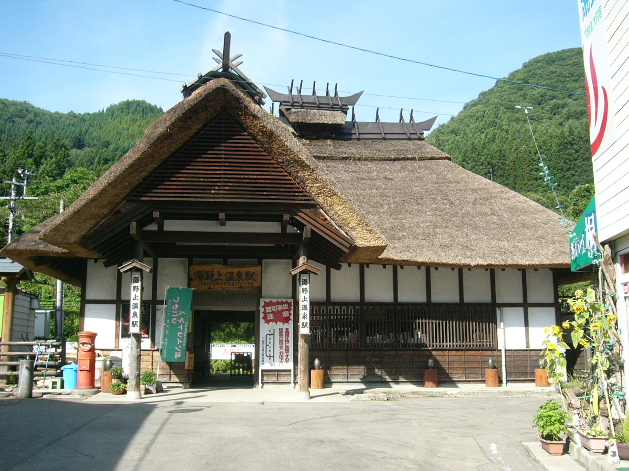 Yunokamionsen Station